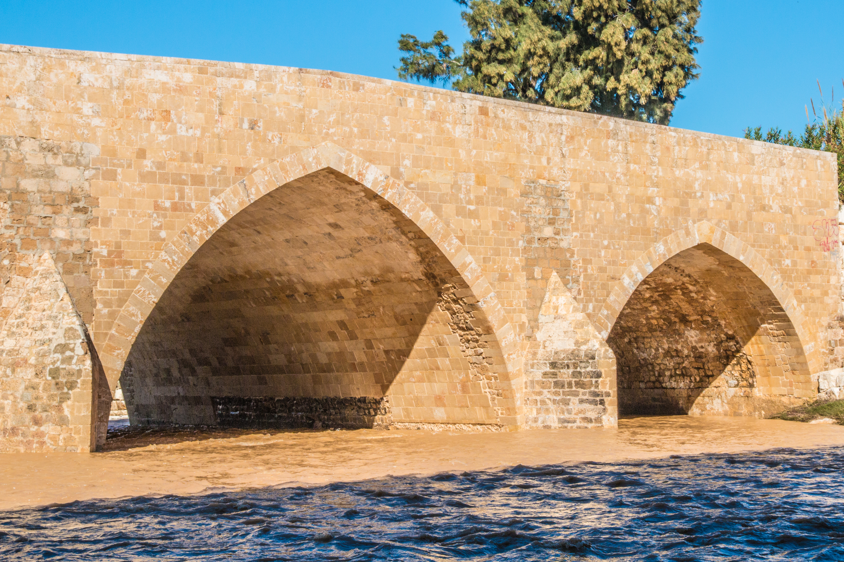 גשר עד הלום הוא גשר על נחל לכיש החוצה את כביש 4 ליד אשדוד, מרחק של 35 ק"מ דרומית מתל אביב, סמוך למחלף אשדוד דרום של ימינו. זהו המקום הצפוני ביותר שאליו הגיע הצבא המצרי שפלש לארץ ישראל במלחמת העצמאות במטרה להשמיד את מדינת ישראל שזה אך הוקמה. לאחר התנגשותו בצה"ל נעצר בגשר, ומכאן שמו "עד הלום". הגשר נבנה בסוף המאה ה-19 בידי השלטון העות'מאני מעל אפיק "ואדי סוכריר" (נחל לכיש) שחצה את הדרך מיבנה ל"אל-מג'דל" (אשקלון). הוא נבנה על יסודותיו של גשר מהתקופה הרומית.